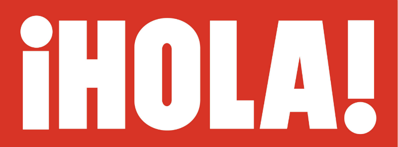 Logo de la Revista ¡HOLA!